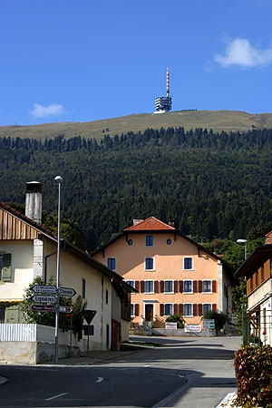 Nods, im Hintergrund der Chasseral mit Sendeturm